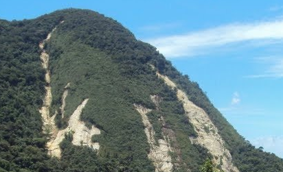 Deslizamentos em morros do trajeto Paraty-Cunha.